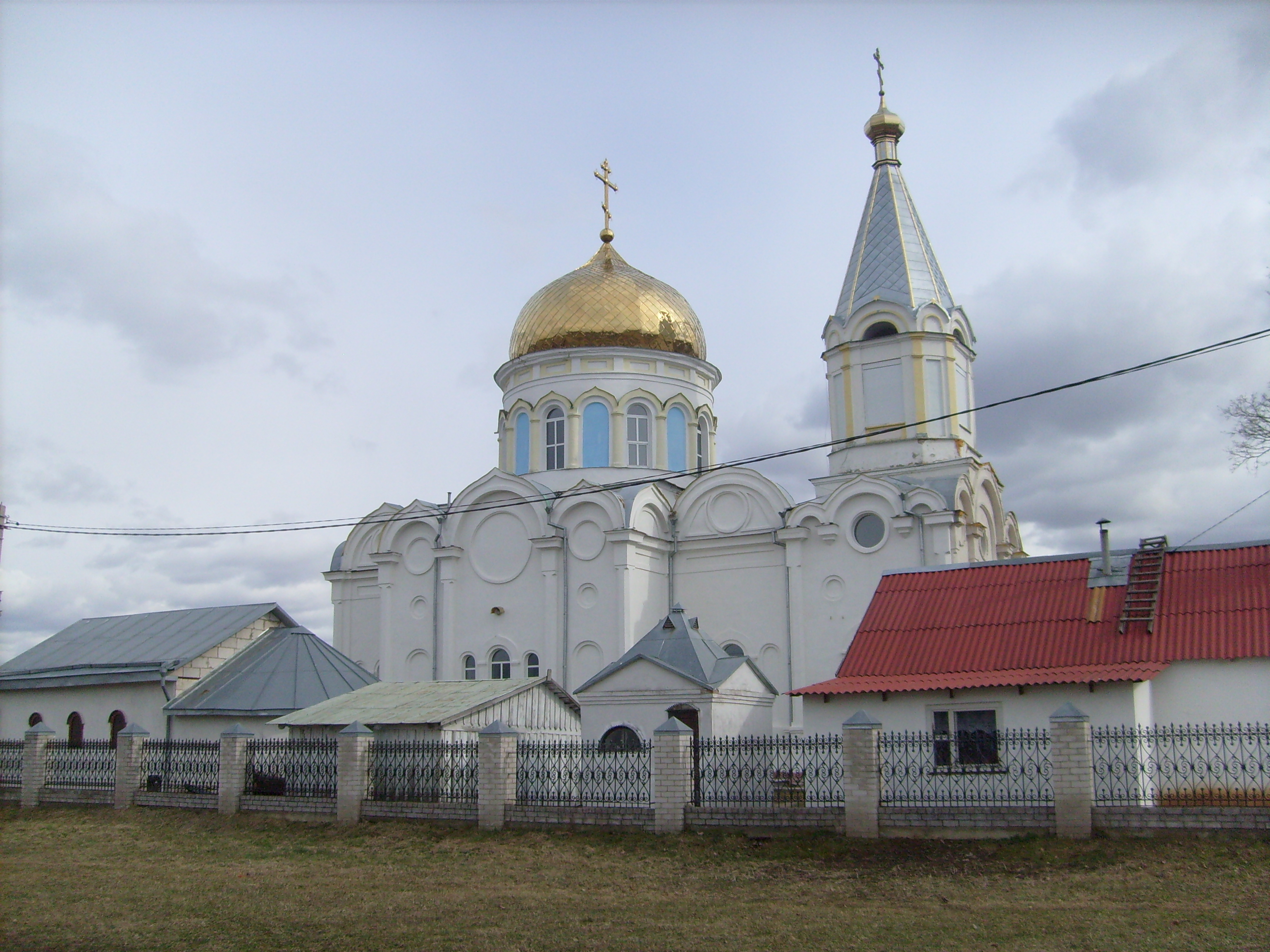 Храм Вознесения Господня в городе Горки